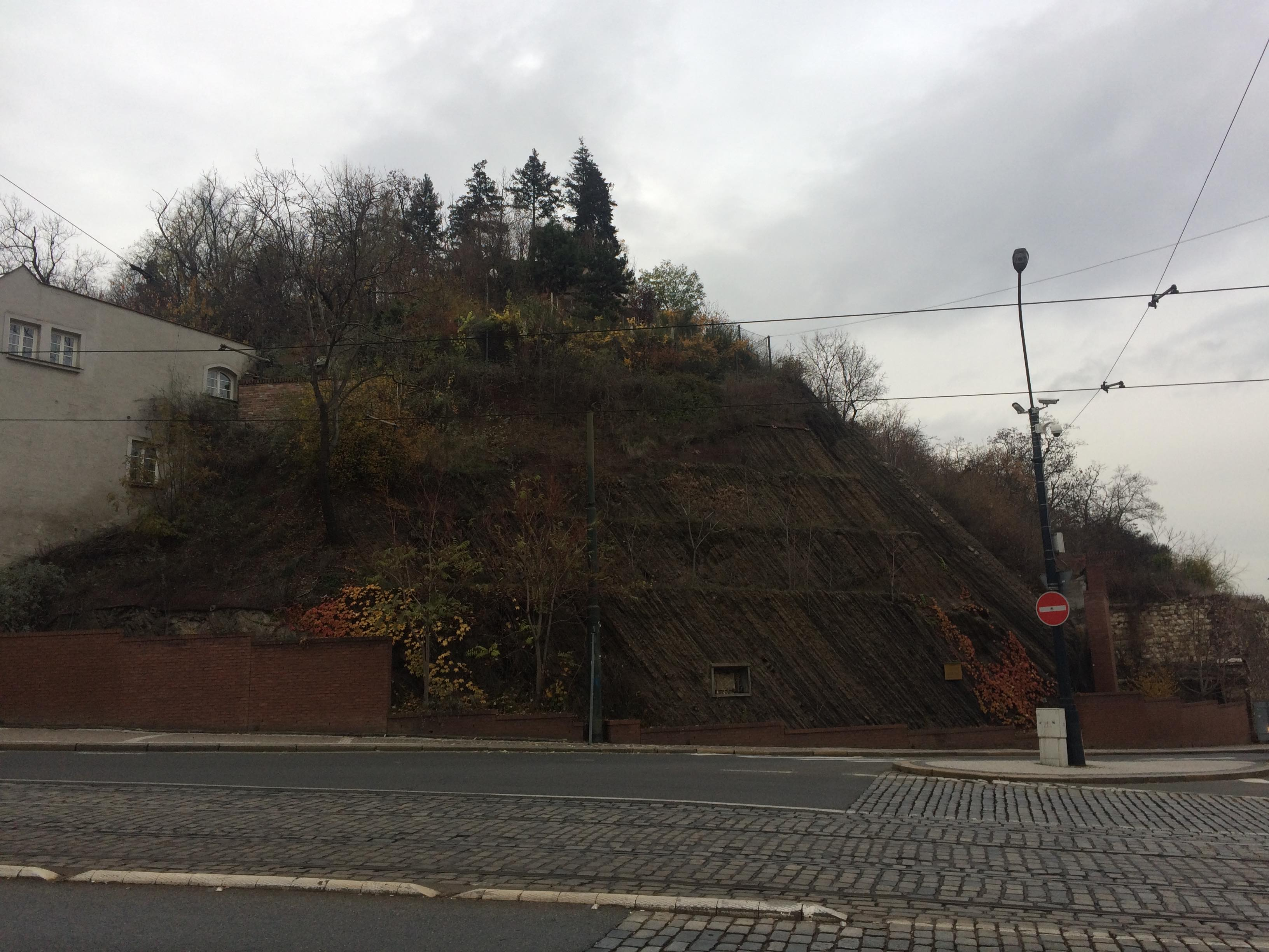 Letenský profil - pohled na zárůst stromy a keři